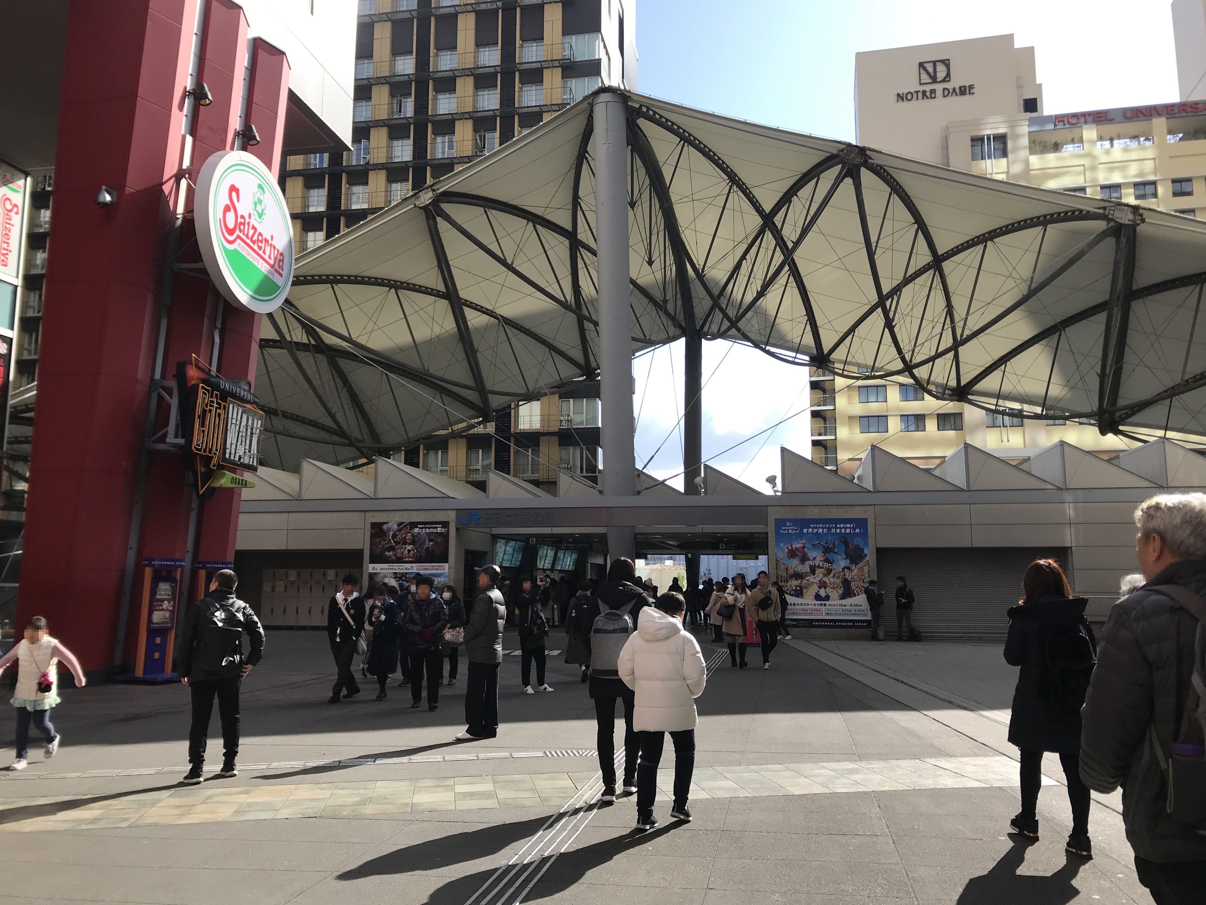 ユニバーサルシティ駅の駅舎